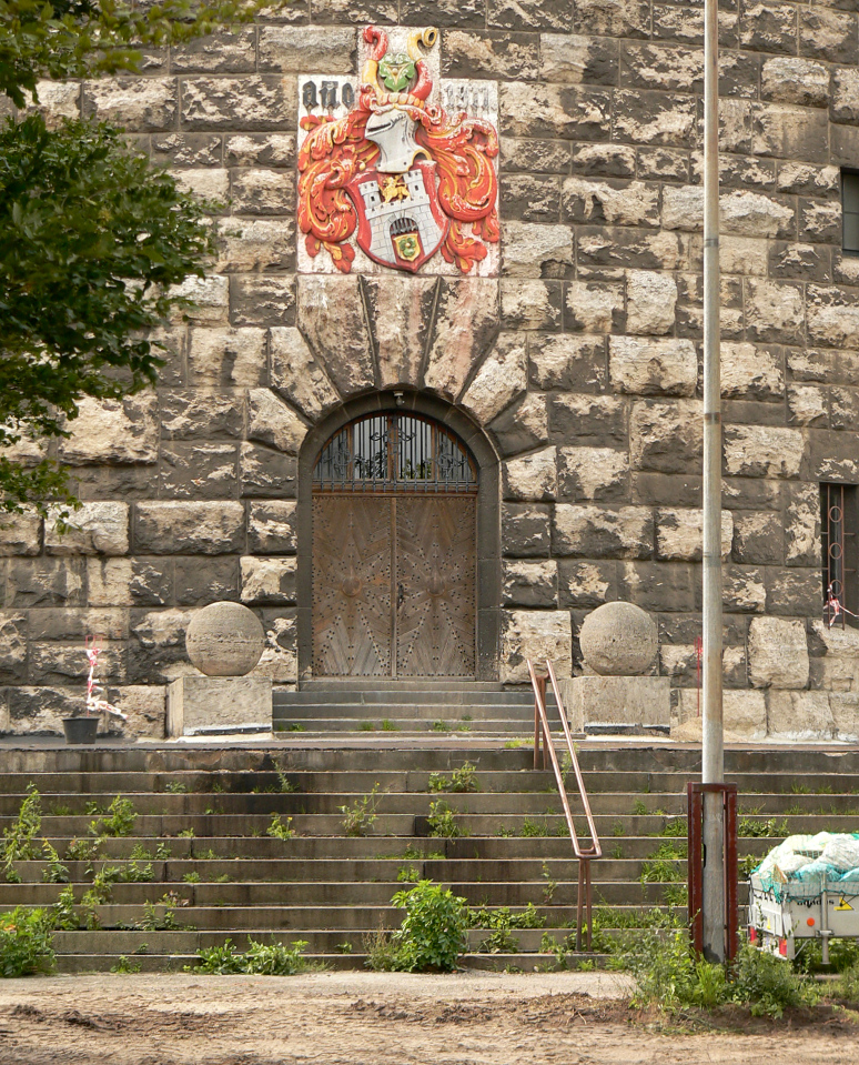 Eingangstür des Wasserturm Hannover